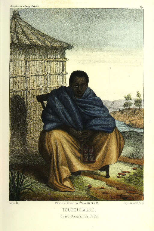 Grand marabout toucouleur. Planche n° XIX de Esquisses sénégalaises de l'abbé Boilat, 1853.